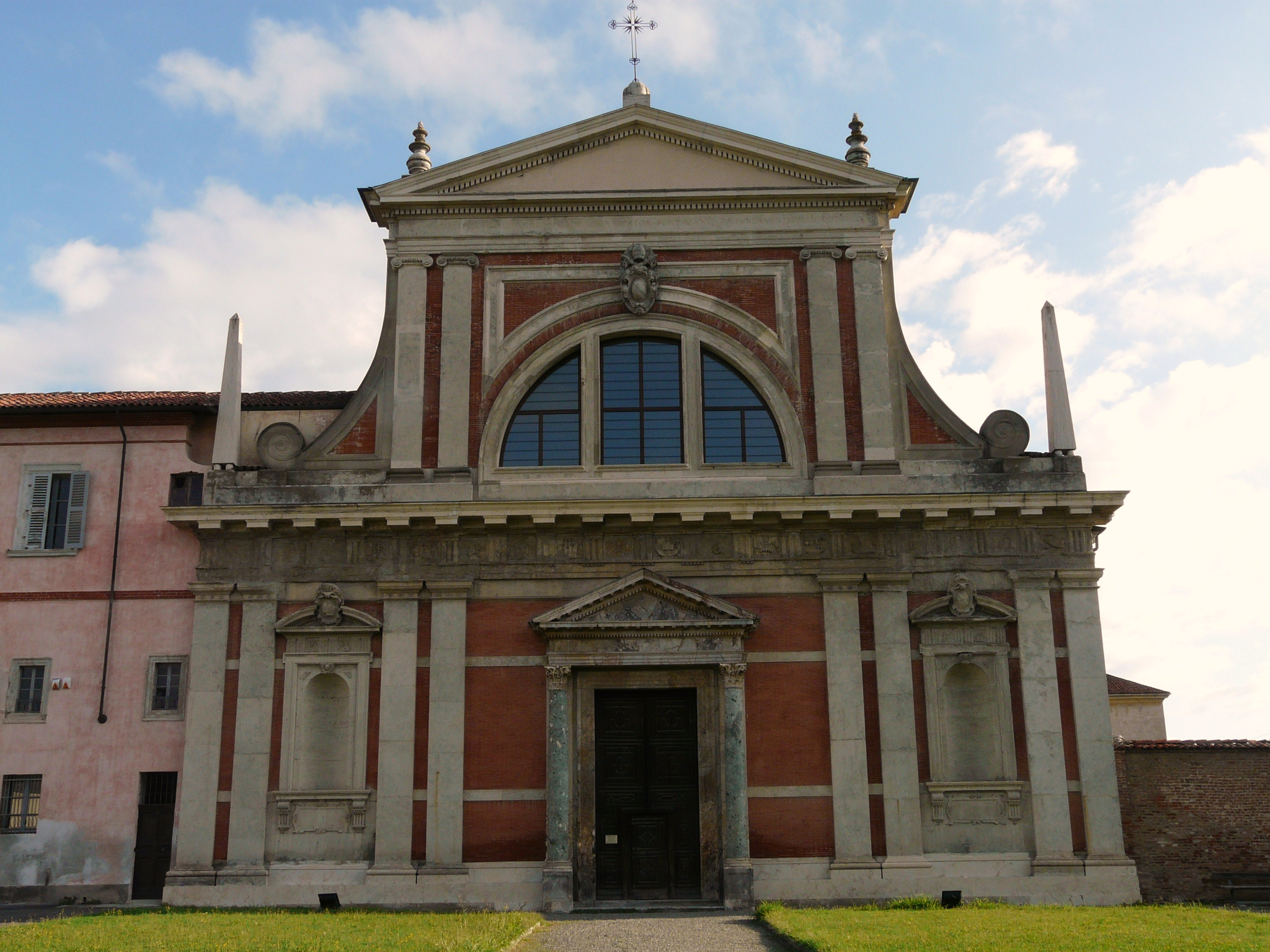 Complesso monumentale di Santa Croce, Bosco Marengo, Piemonte, Italia